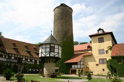 Westerburg bei Dedeleben, public domain, eigenes Foto von 2005 Mewes